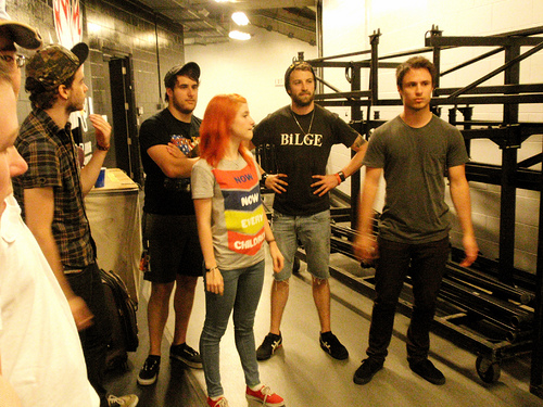 Miembros oficiales de Paramore en 2009, de izquiera a derecha: Taylor York, Zac Farro, Hayley Williams, Jeremy Davis y Josh Farro